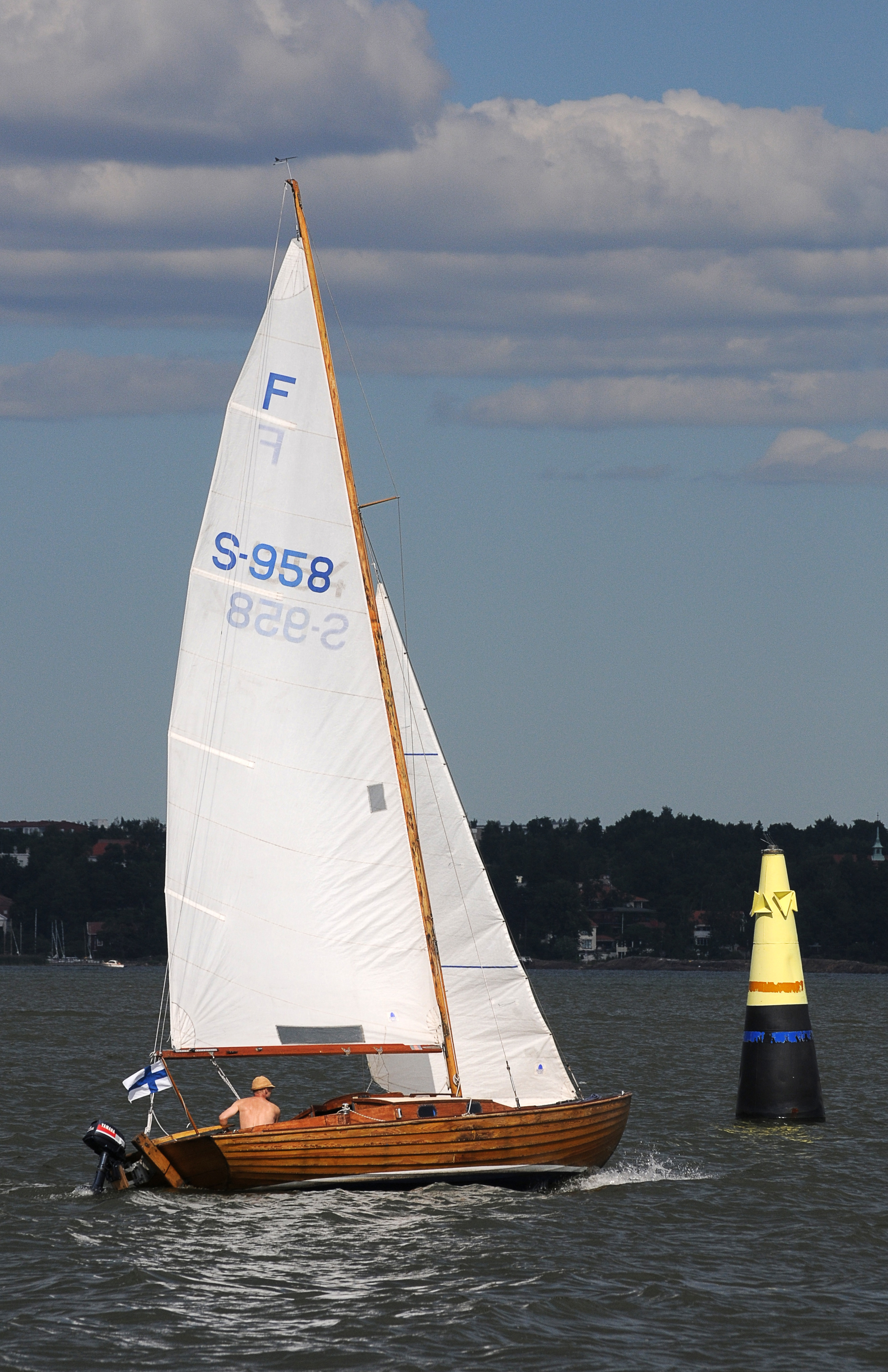 Helsinki; Stadthafen; Segelboot der Klasse Nordic Folkboat